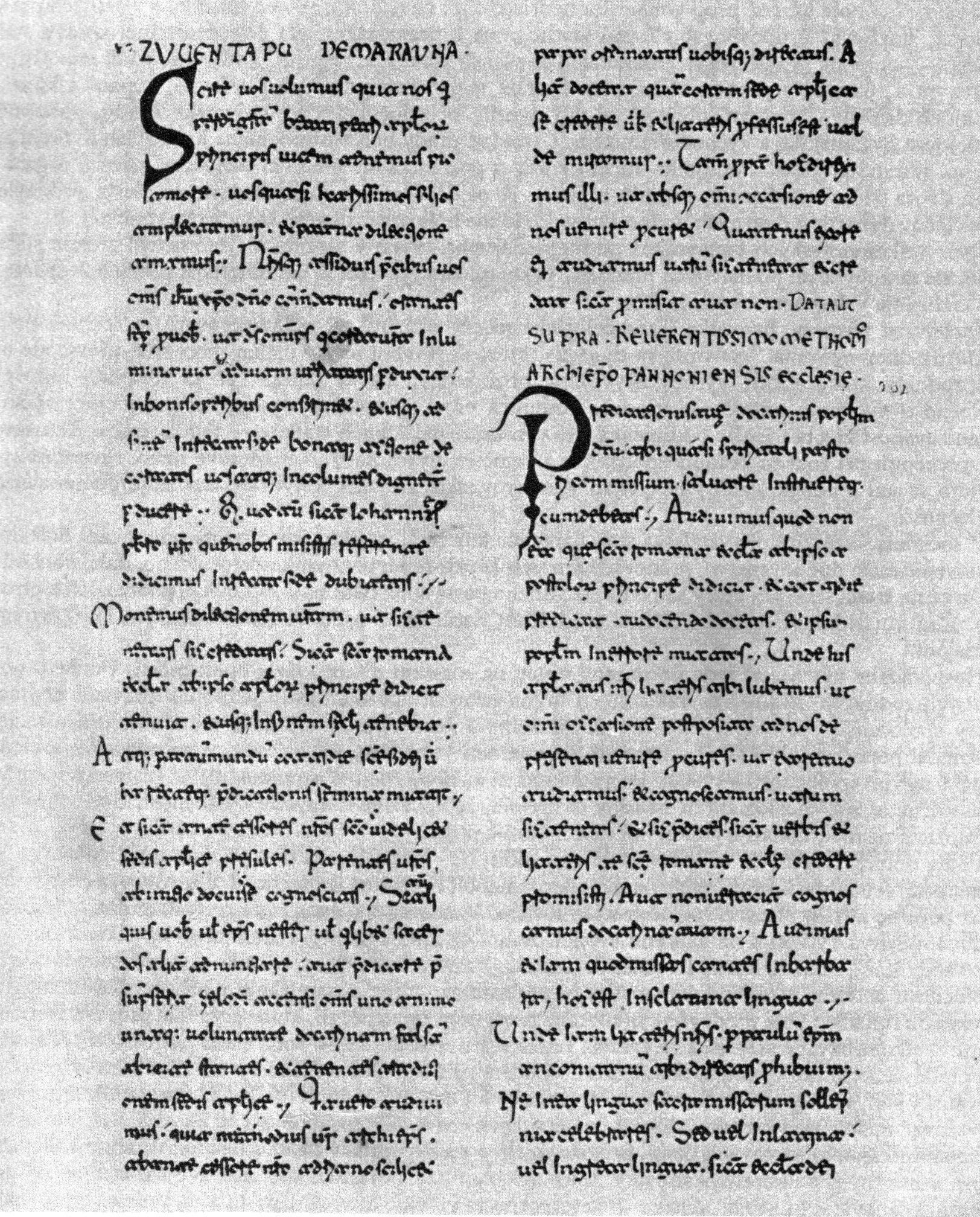 Schreiben Johanns VIII. an Herzog Svatopluk von Mähren Scire vos volumus (Epistolae (in Quart) 7: Epistolae Karolini aevi (V). Herausgegeben von Erich Caspar, Gerhard Laehr u. a. Berlin 1912, S. 160 Nr. 200); in der Mitte der rechten Spalte beginnt das Ladungsschreiben des Papstes an Erzbischof Methodios (Caspar S. 161 Nr. 202)